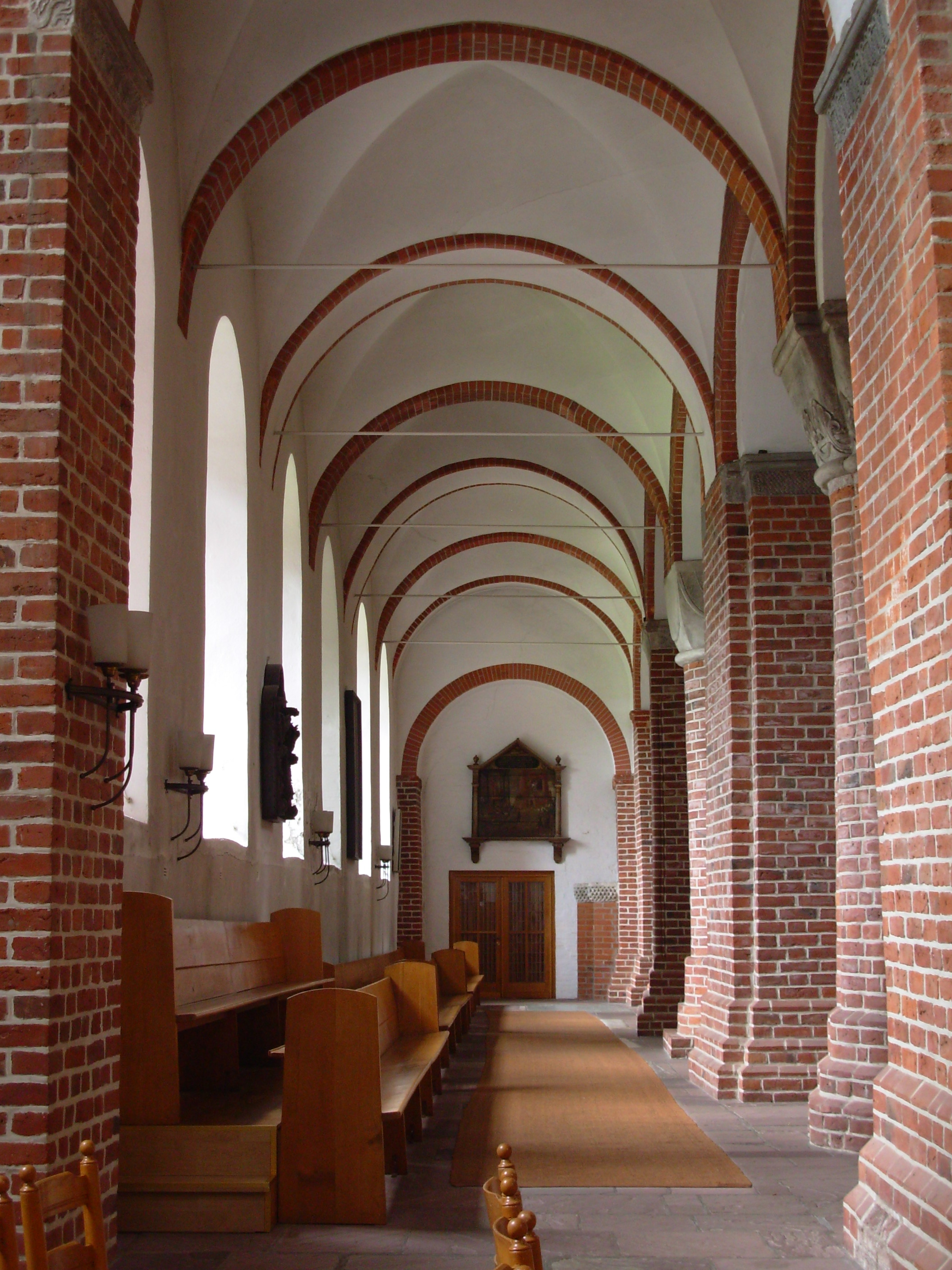 Marienkirche Segeberg, südliches Seitenschiff